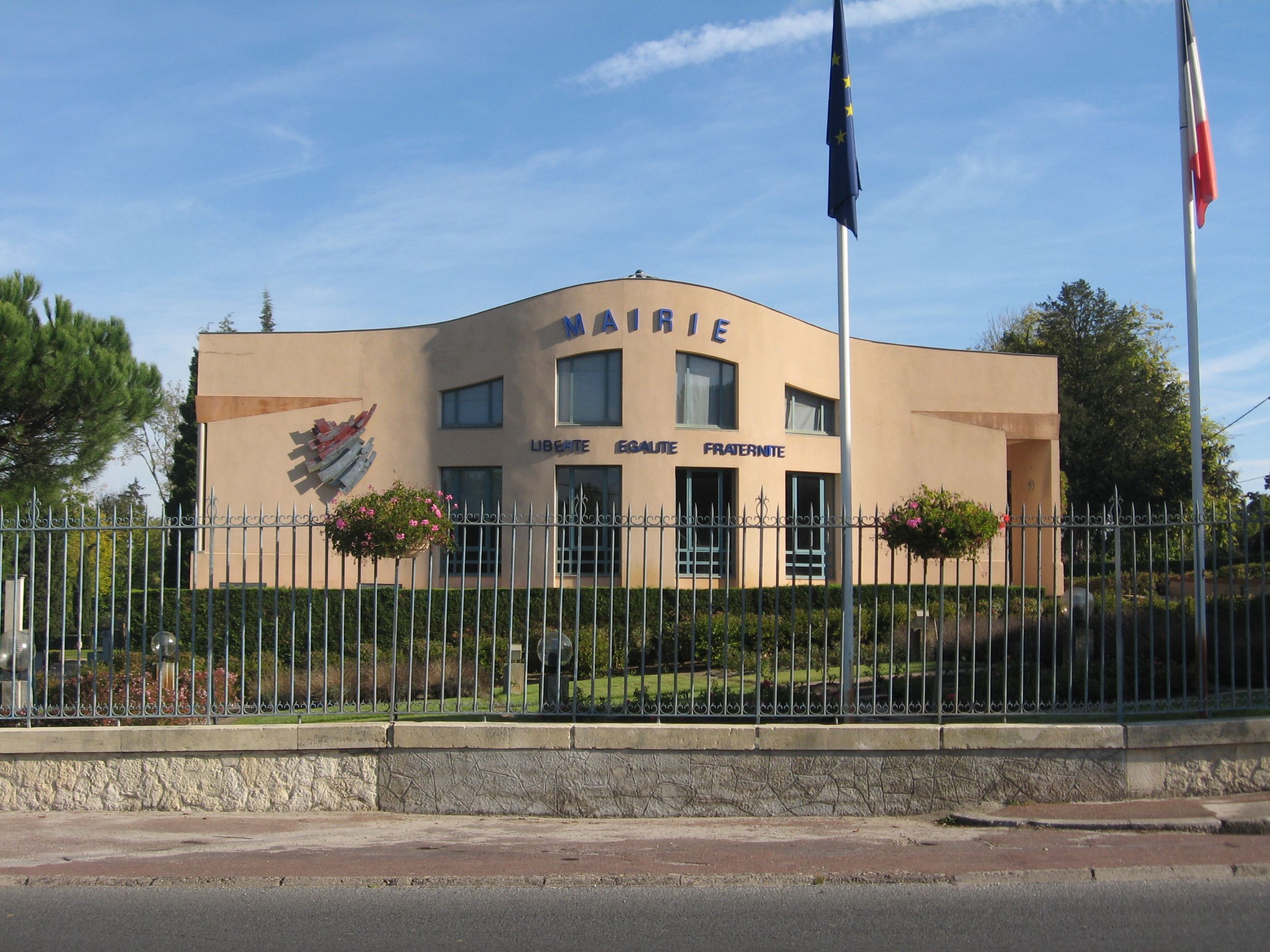 La mairie de Léognan